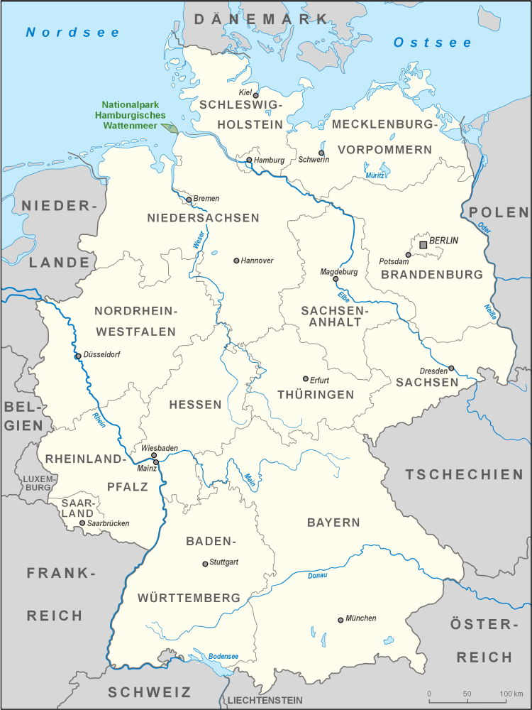 Karte des Nationalparks Hamburgisches Wattenmeer in Deutschland